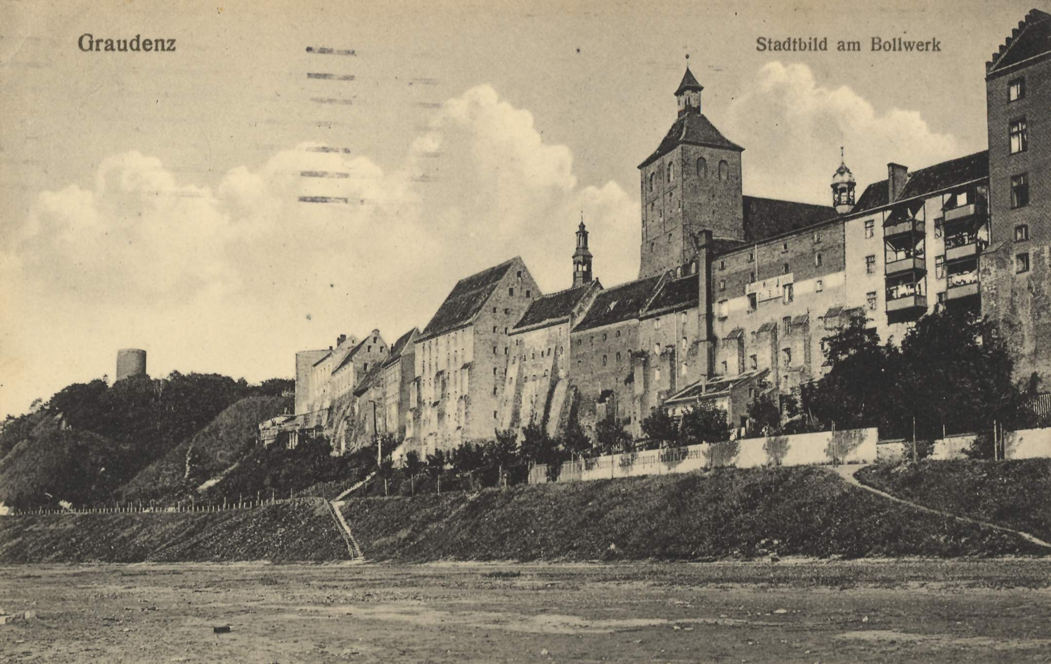 Stadtansicht am Bollwerk